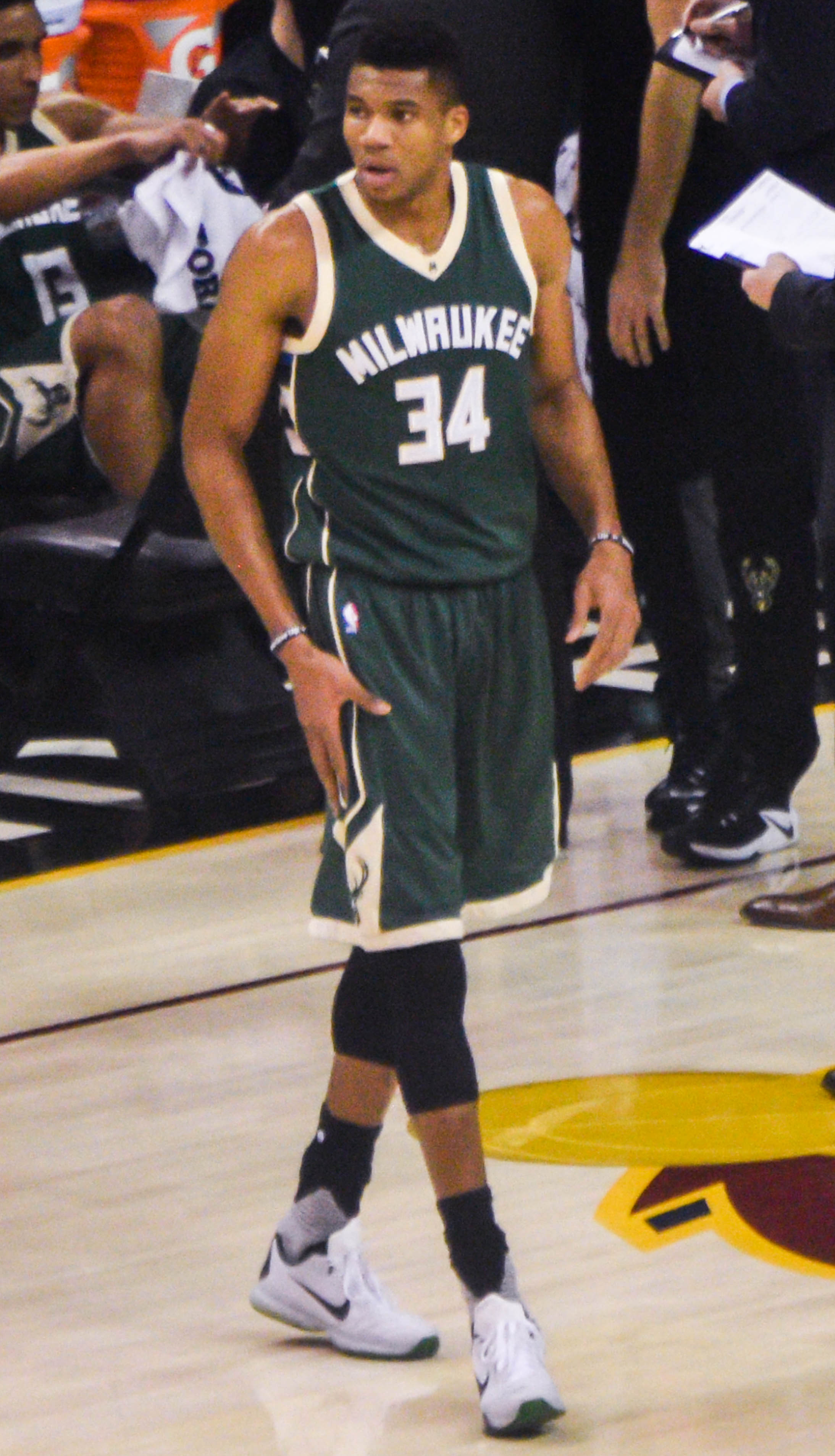 Giannis Antetokoummpo